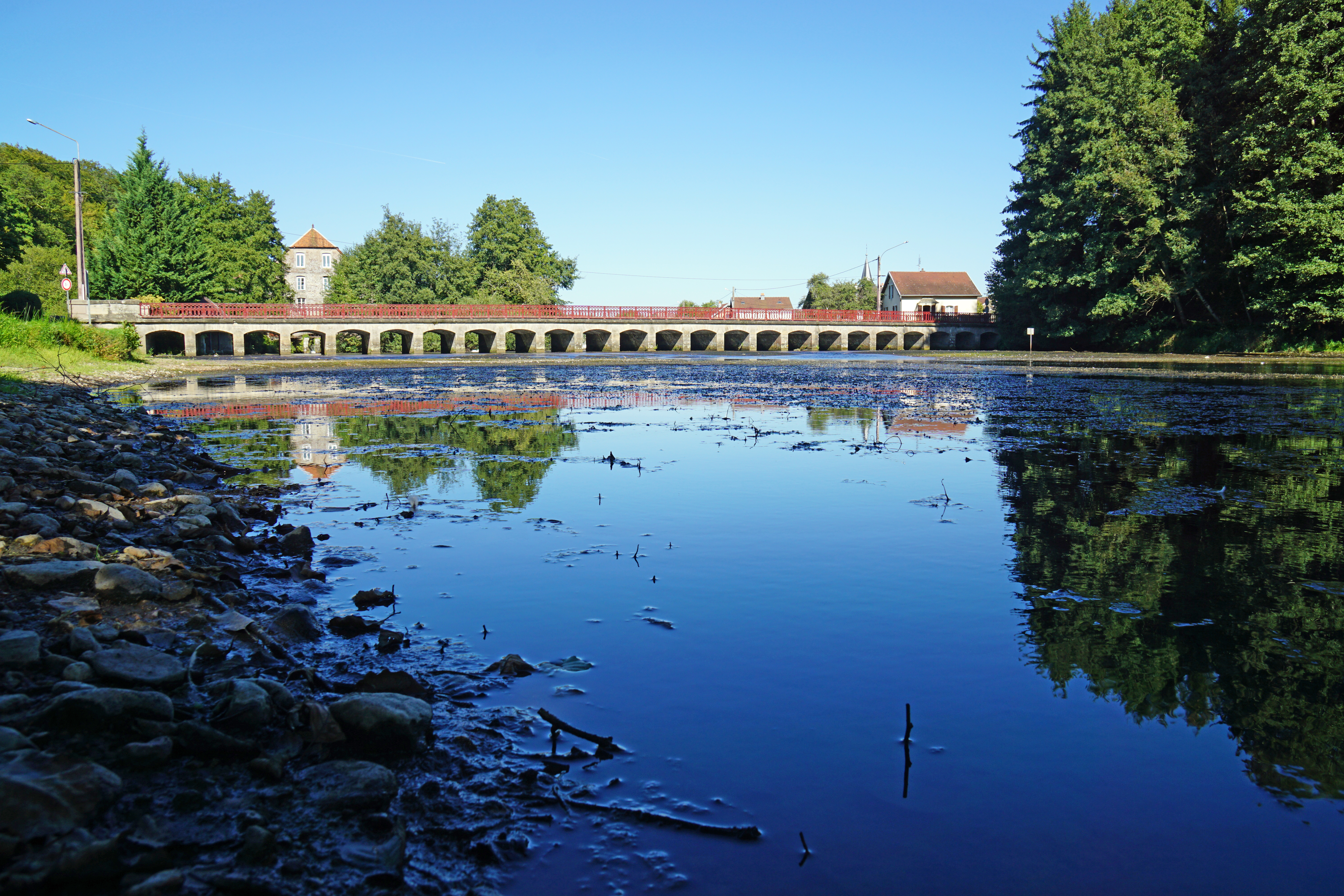 La Reigne à Magny-Vernois 70.